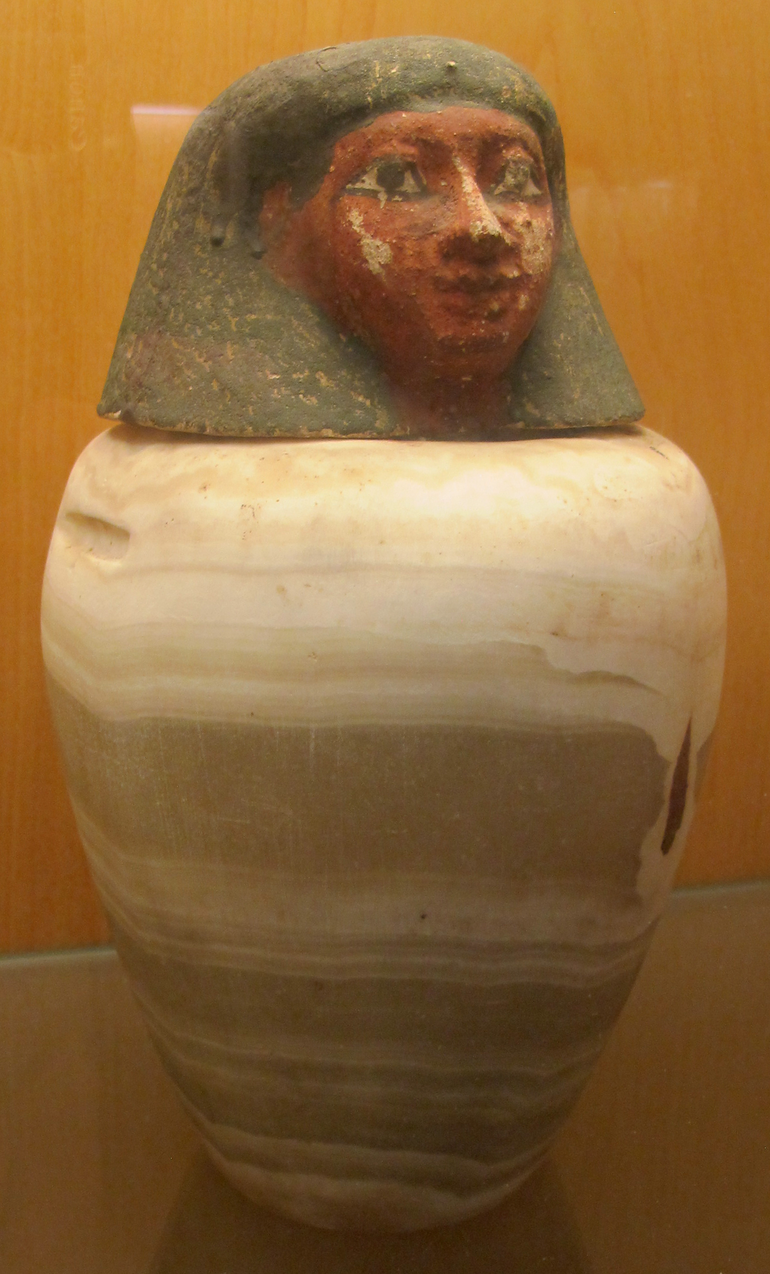 Ancient Egyptian art in the Museo archeologico nazionale (Florence)